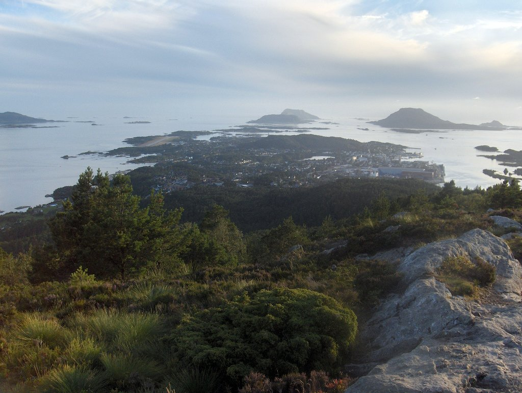 Florø sett frå Brandsøyåsen